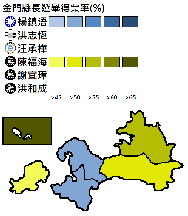 中文（台灣）: 金門縣長選舉得票分布。